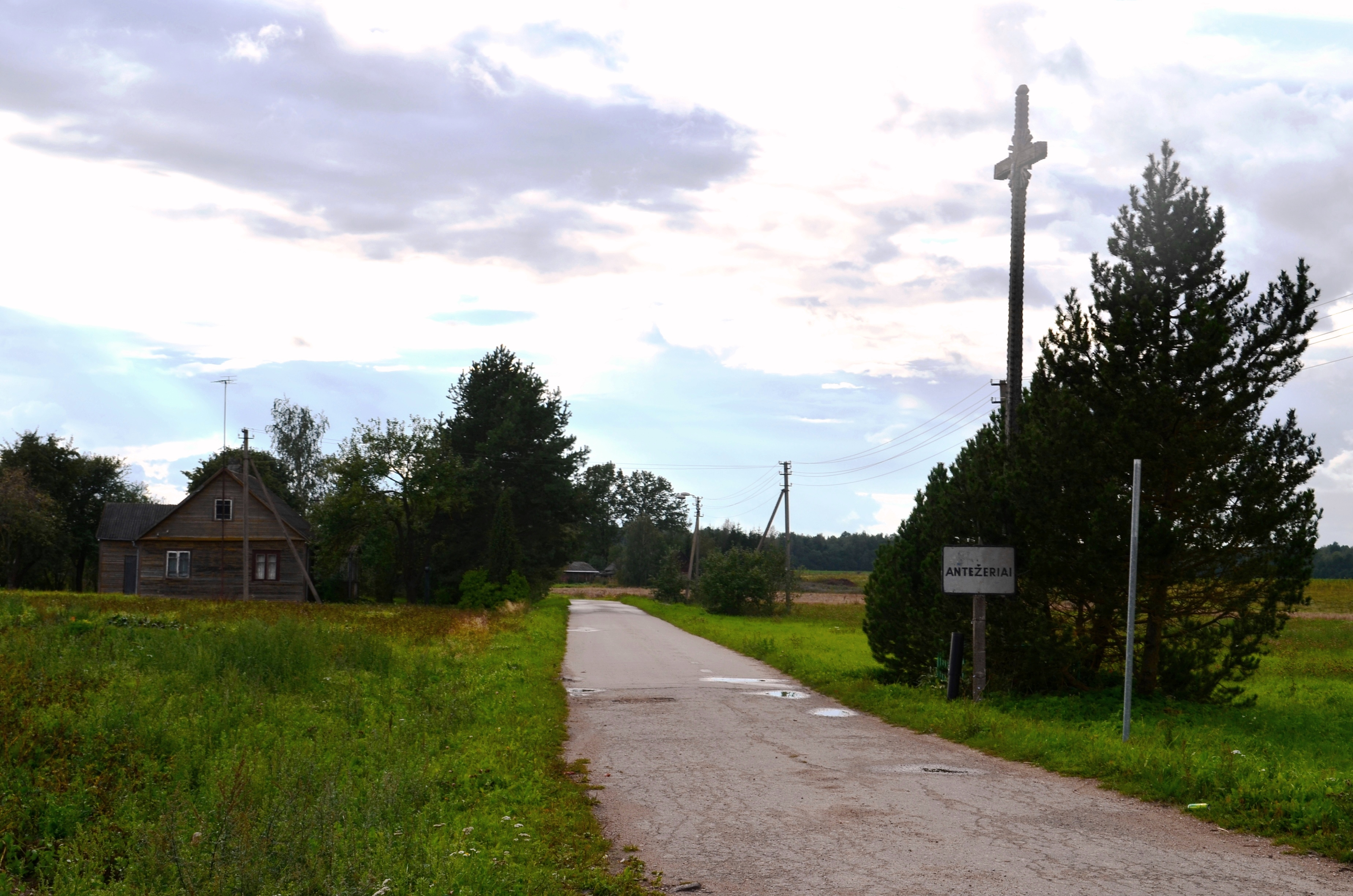 Antežeriai, Kėdainių r.